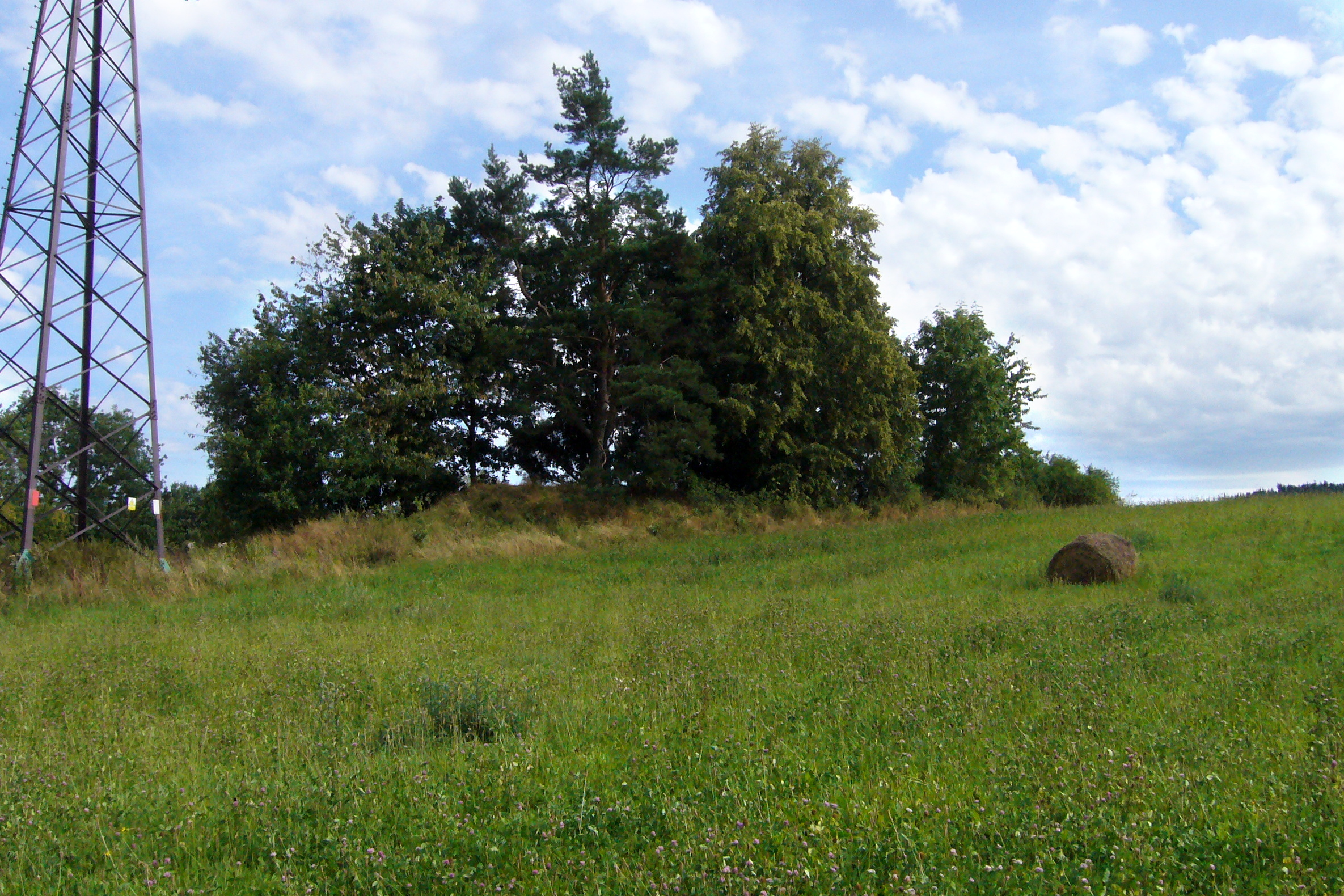 Tvrziště Hrádek u Husince